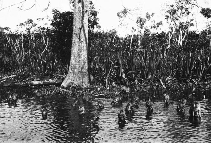 Foto. Bavianenkolonie op het apeneiland Kembang in de Barito-rivier, Bandjermasin